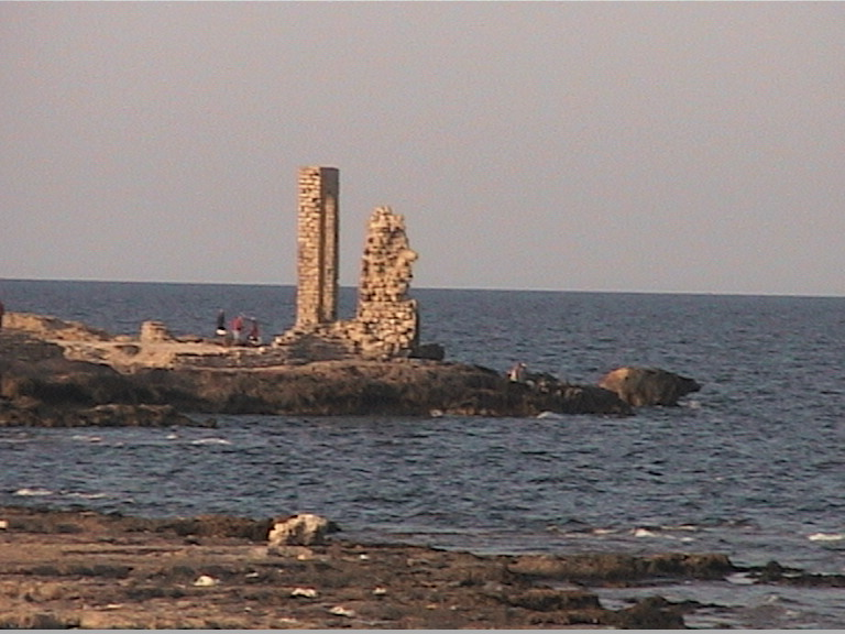 Vestiges des remparts de la ville de Mahdia